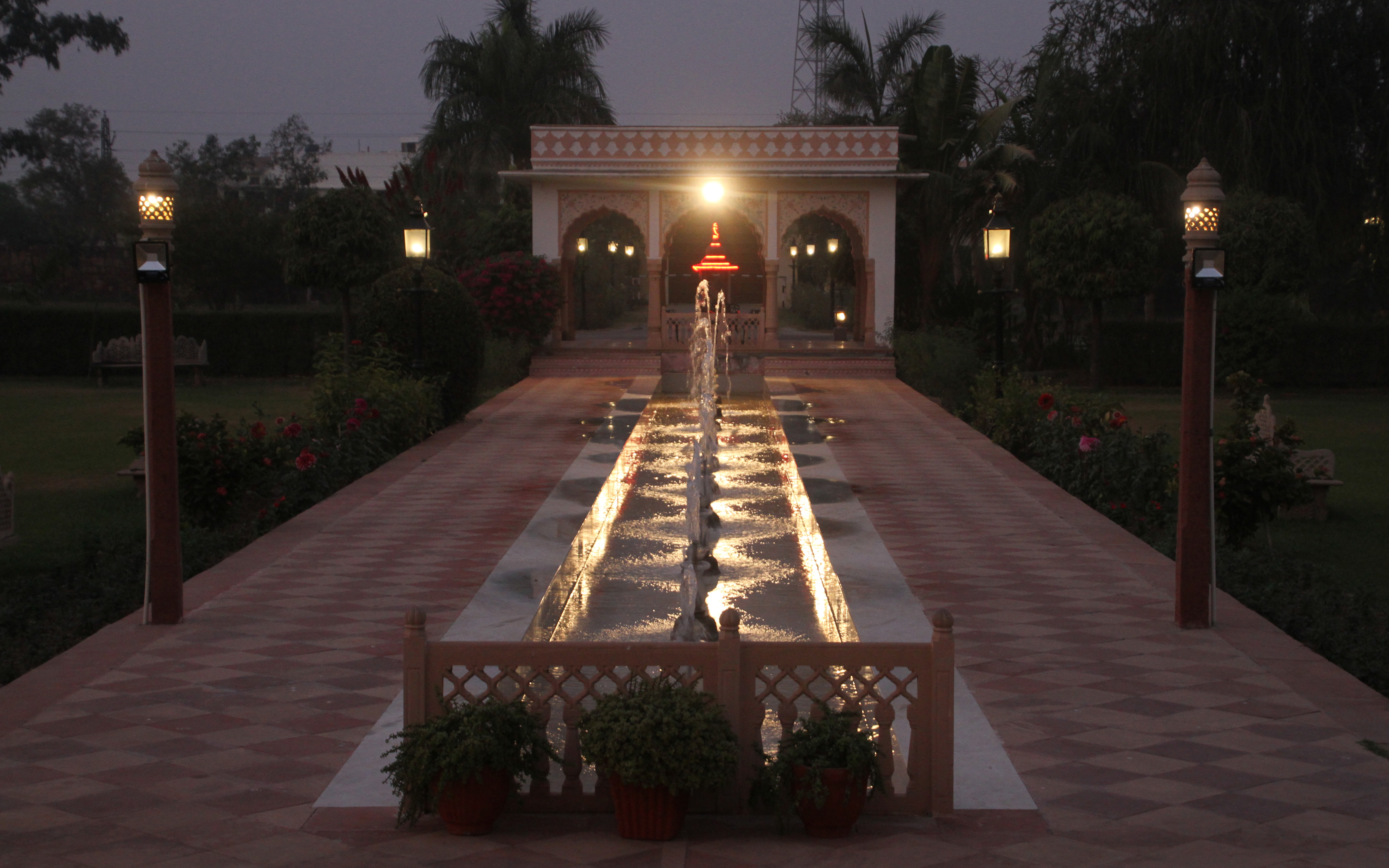 Laxmi Vilas Palace (Bharatpur)